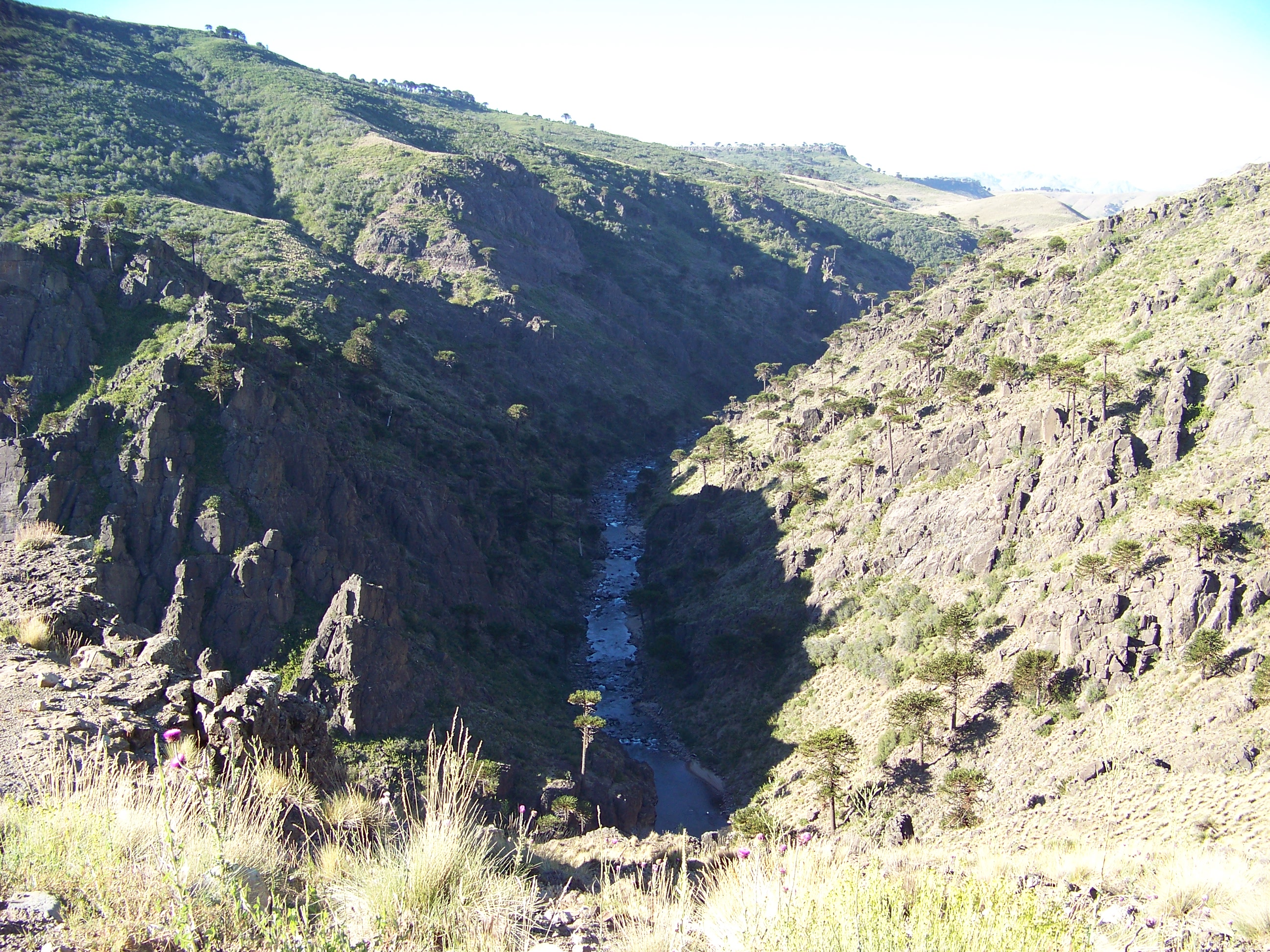 Vista del Rio Kilka Neuquen Argentina